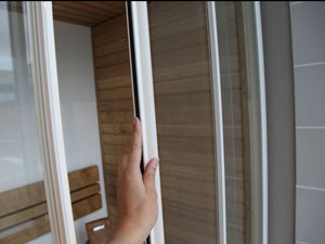 Liukuovet säästävät tilaa ja lisäävät avaruutta kylpyhuonesaunoihin.